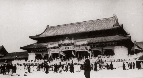 太和门的冯国璋大总统的灵堂。